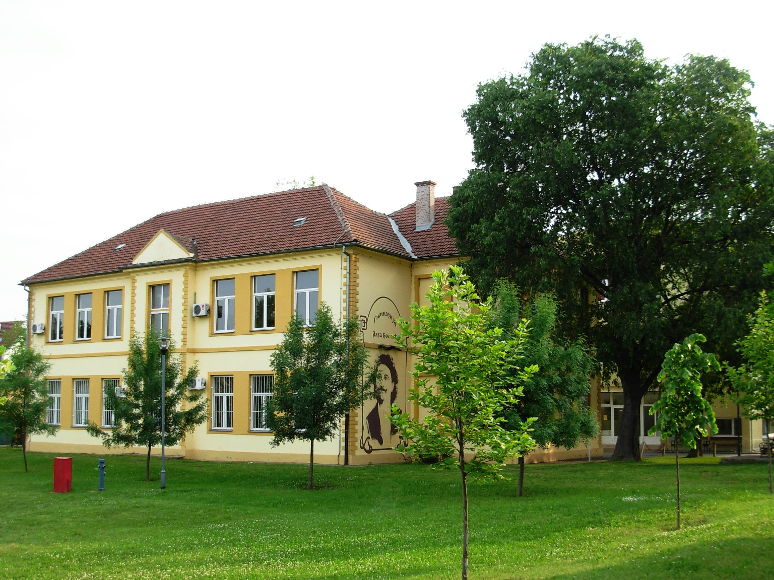 Gimnazija "Laza Kostić" u Novom Sadu.